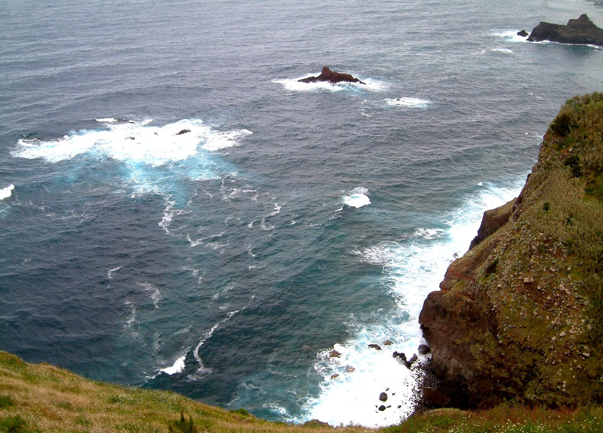 Madeira_küste. Photograph: Peggy